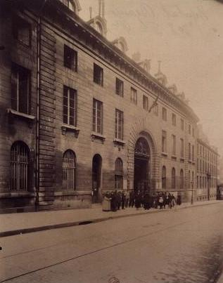 Ancienne hospice Beaujon, 202 rue du Faubourg Saint-Honoré, Paris. Construit par l'architecte Nicolas-Claude Girardin pour le financier Nicolas Beaujon. Photographie positive sur papier albuminé d'après négatif sur verre au gélatinobromure ; 21,6 x 17,2 cm (épr.). Paris, Bibliothèque nationale de France [Cote : BNF - Est. Eo 109a bte 6 ; n ° micr. T039183].